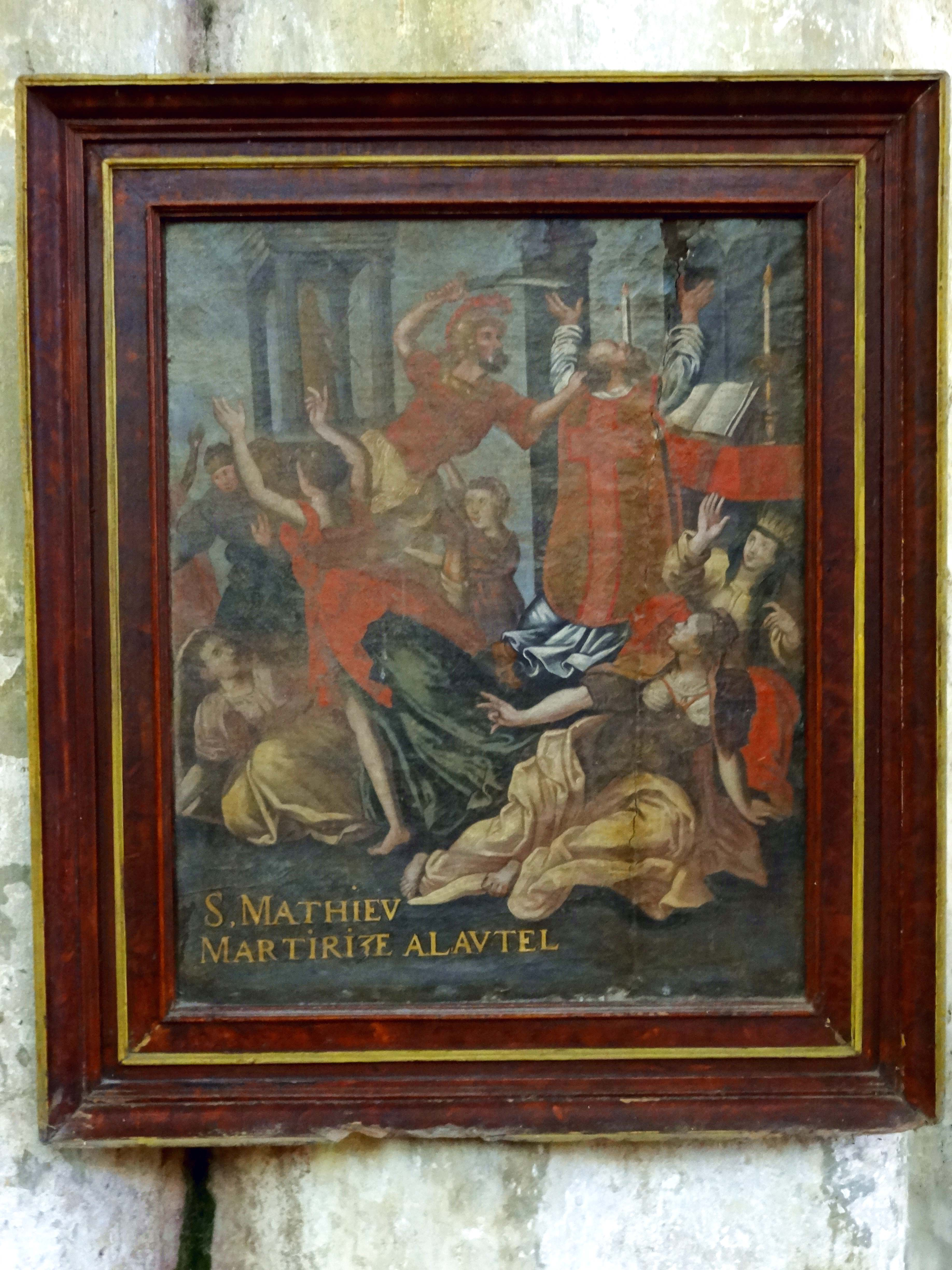 Mobilier de l'église - voir titre.